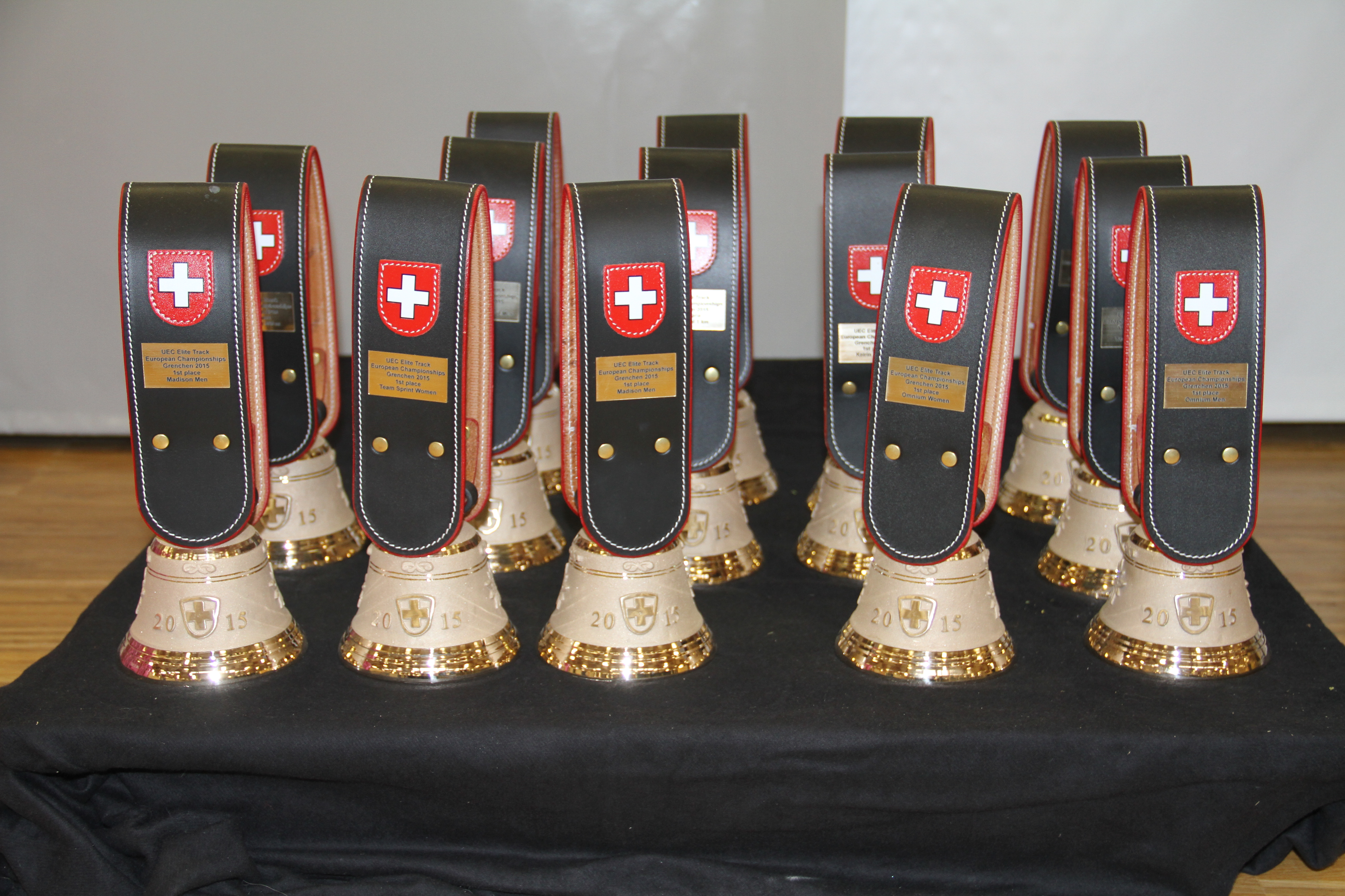 Glocken für die Sieger The making of this document was supported by the Community-Budget of Wikimedia Germany.